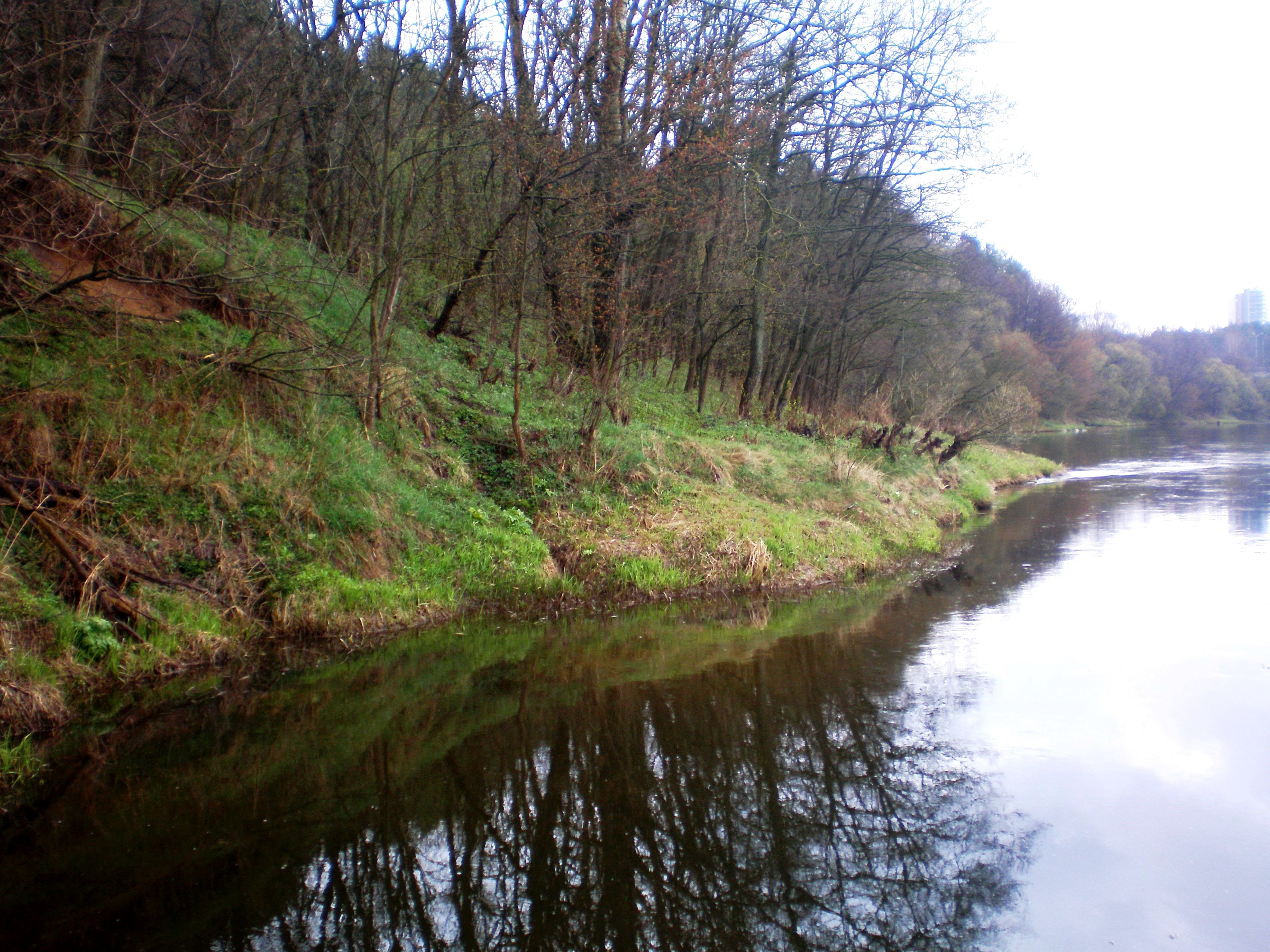 Valakampių atodangos bruožai, Vilnius